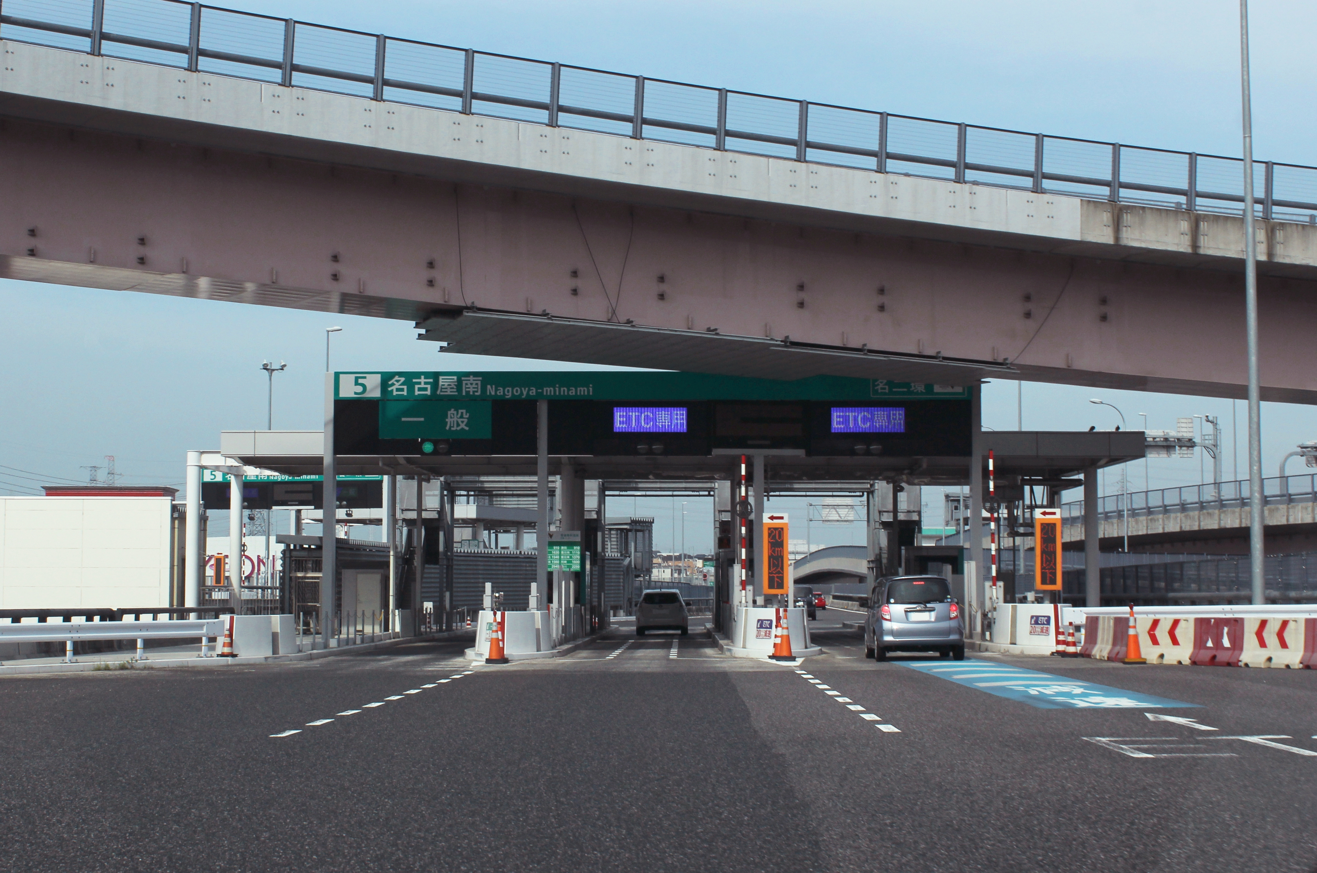 名古屋南ジャンクション料金所